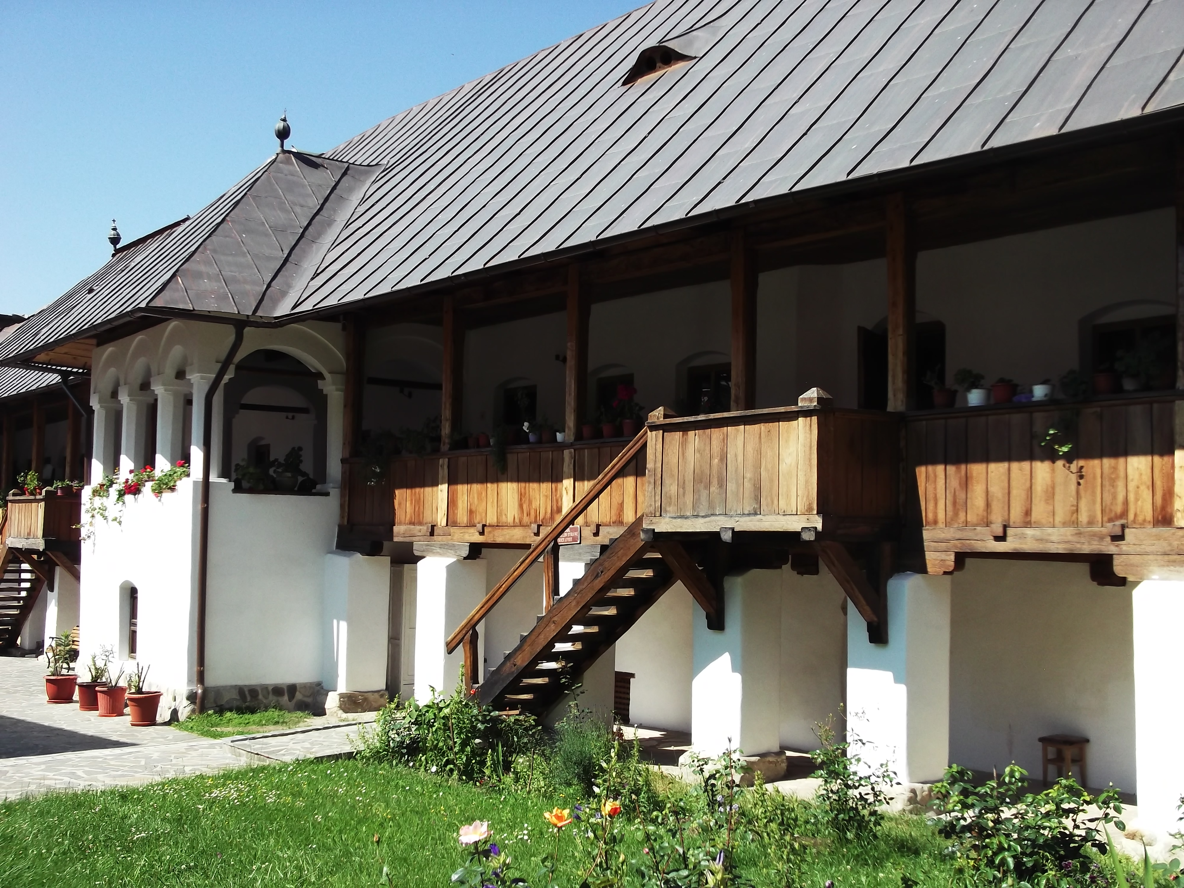 Mănăstirea Polovragi - Stăreția 03